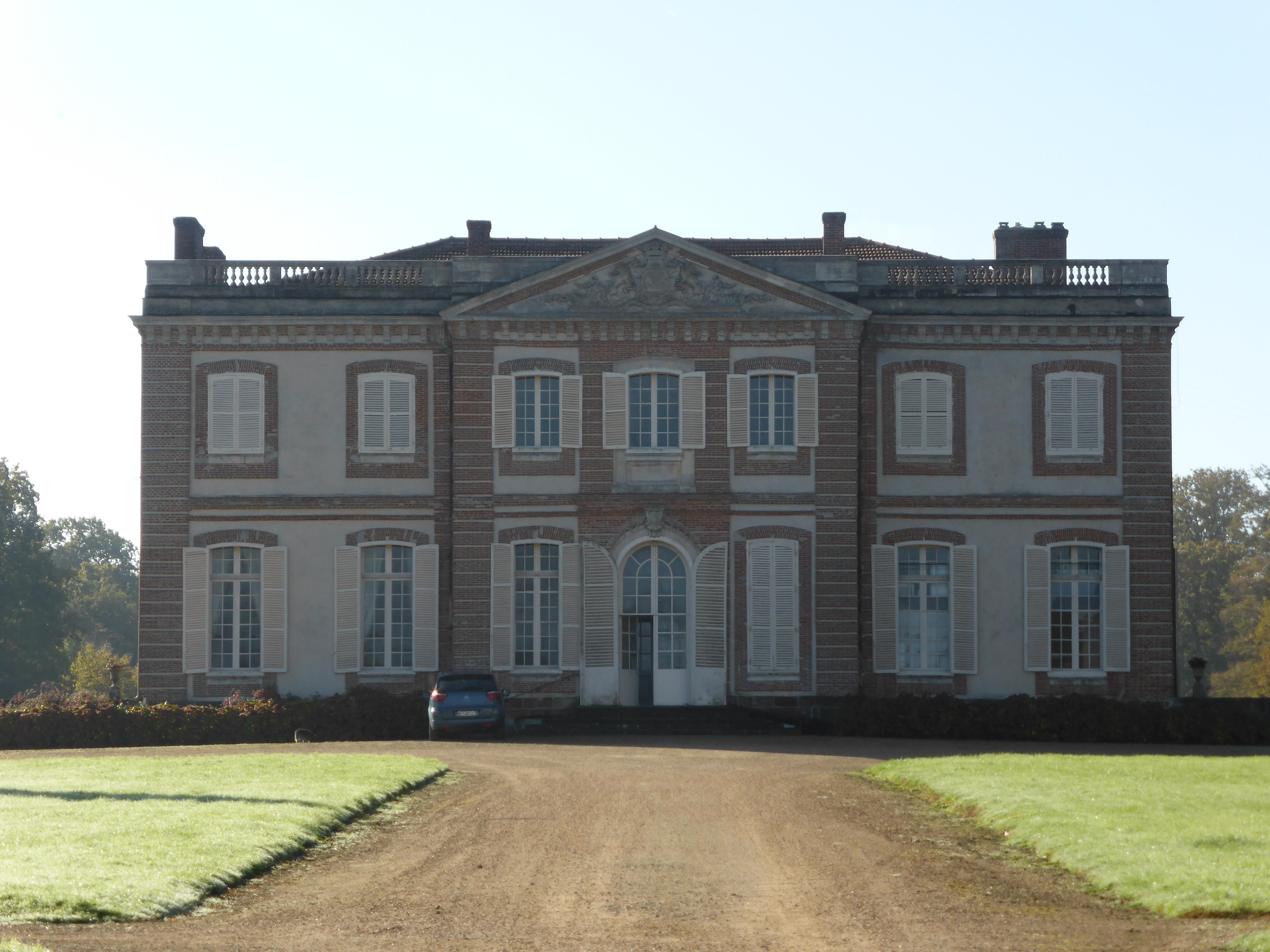 Façade du Château de Chèreperrine, à Origny-le-Roux, dans l'Orne.